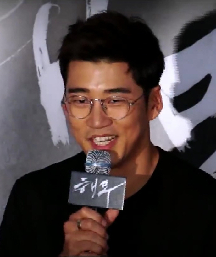 (해무) VIP시사 후기 영상